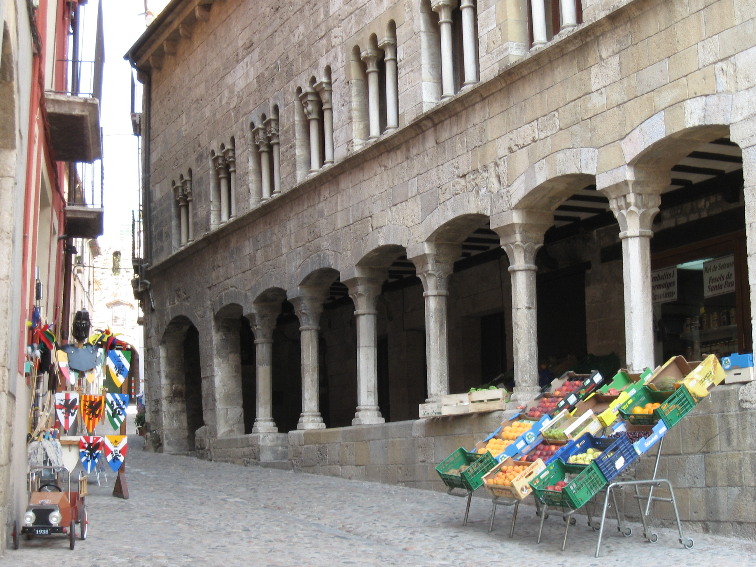 Porxos del carrer Bernat Tallaferro, al costat de la plaça Major de Besalú (Garrotxa)